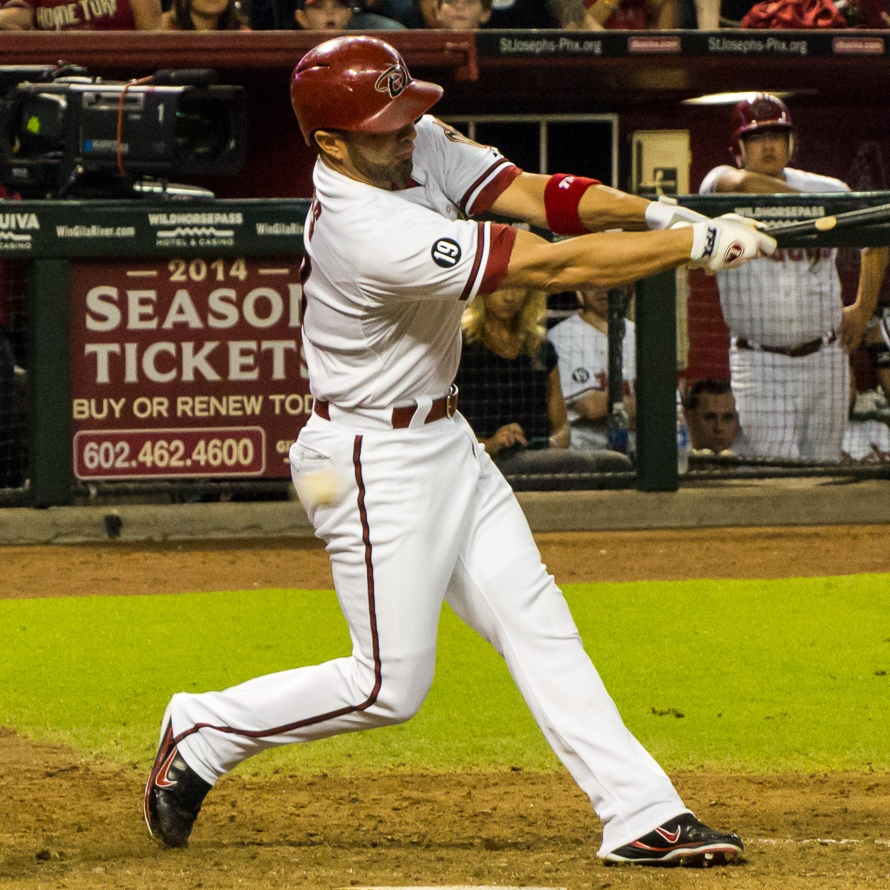 Wil Nieves